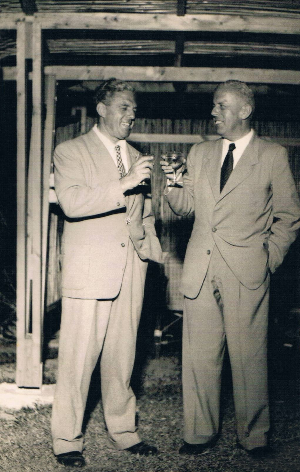 בצלום מופיע בצד שמאל נורמן לוריא הבעלים של מלון בית דולפין בשבי ציון יחד עם מנהלו הראשון של המלון יוסף אקרמן. האירוע פתיחה של אגף במלון בל"ג בעומר 20.5.1954